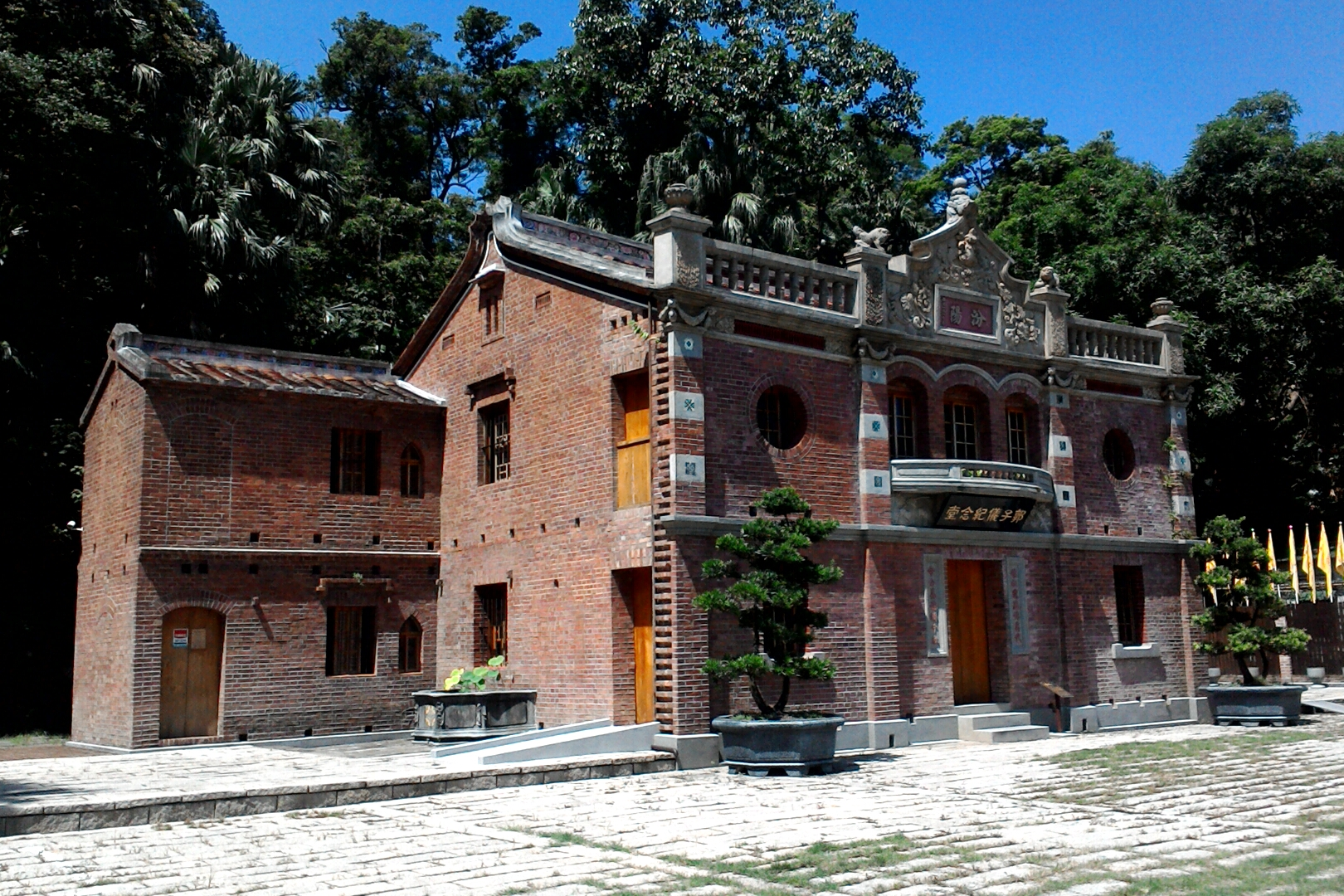 內湖郭氏古宅,台北市內湖區紫陽次分區紫陽里